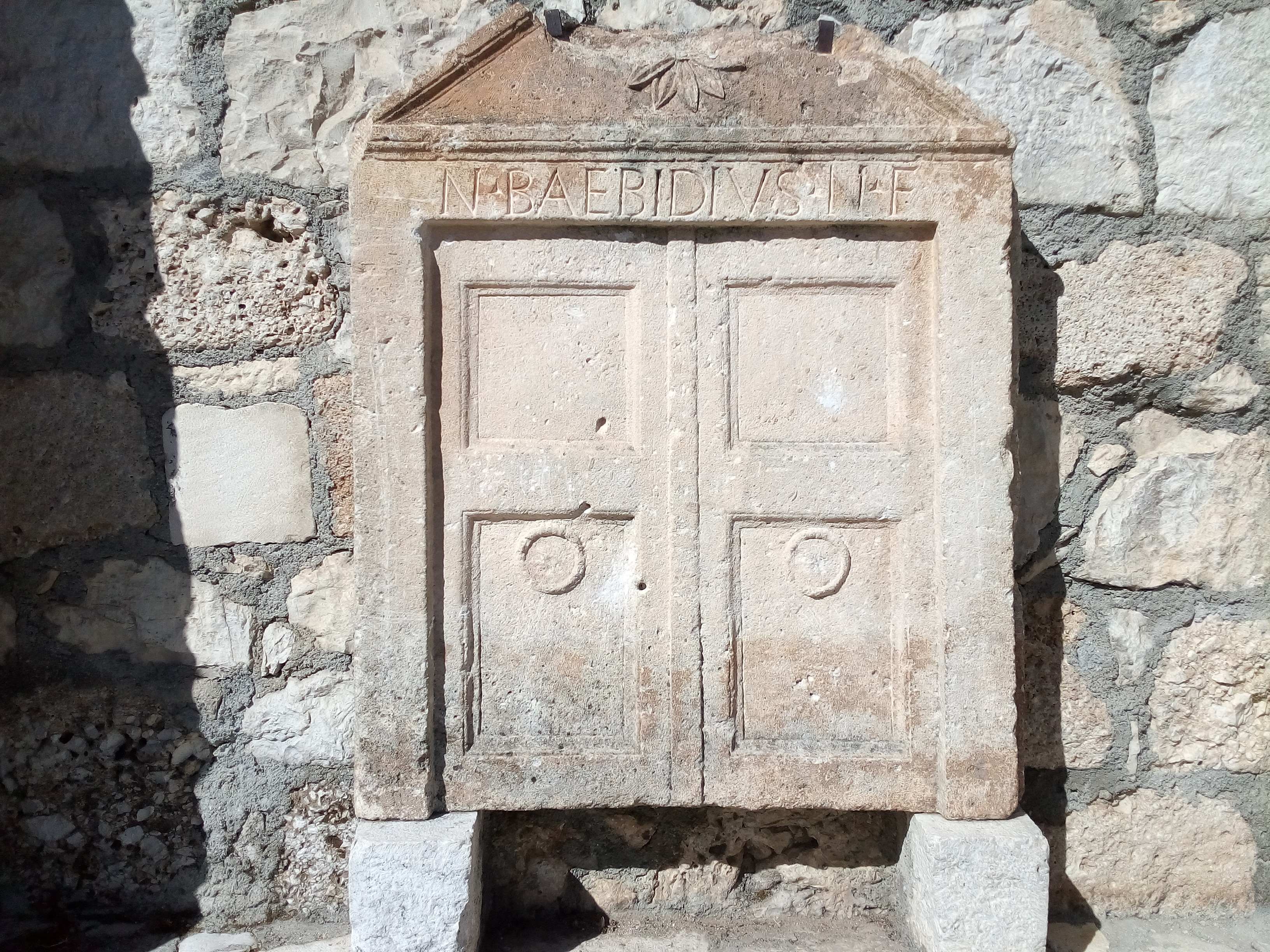 Pietra tombale, Collelongo, Abruzzo